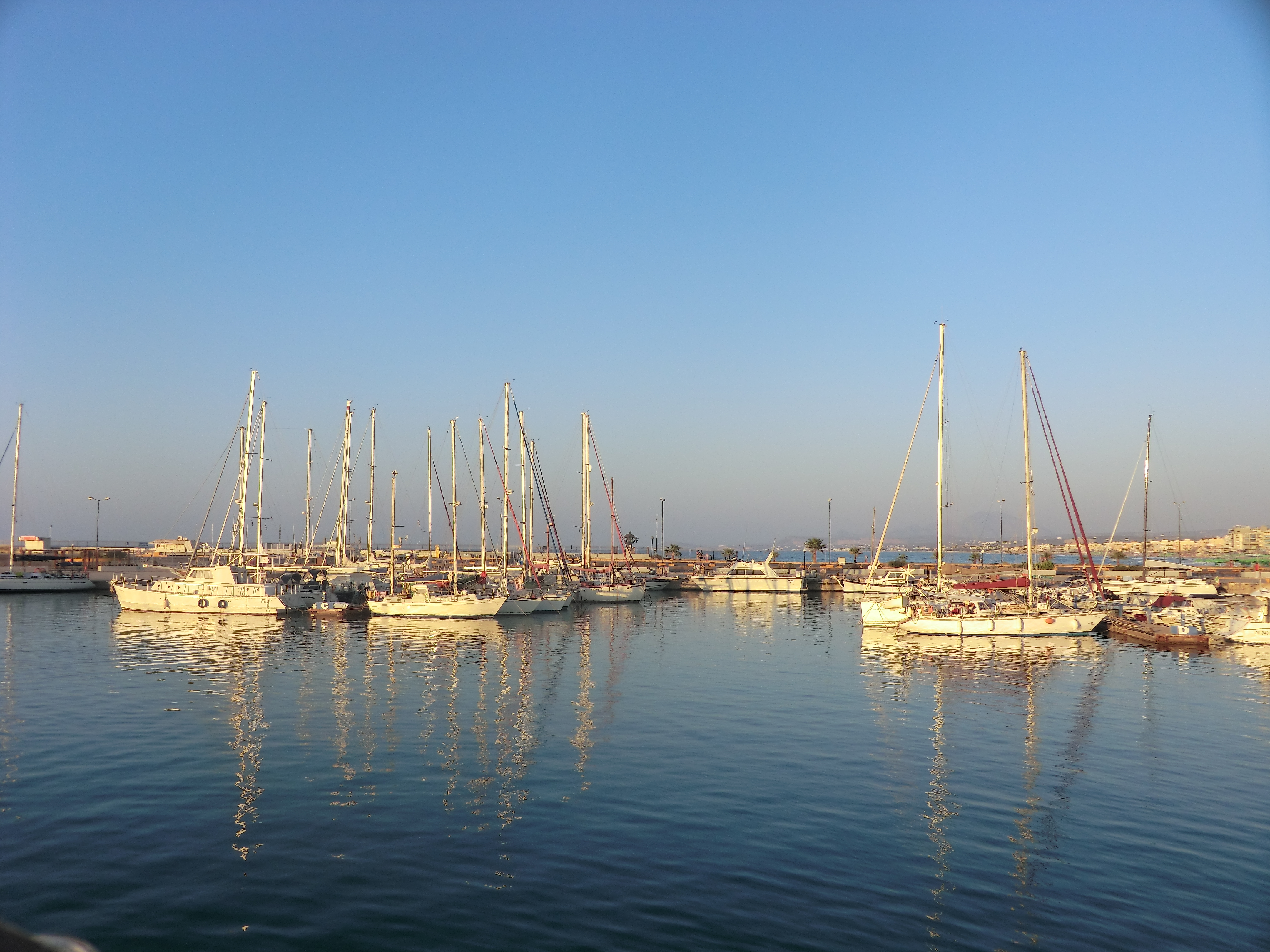 Nouveau port de Réthymnon.